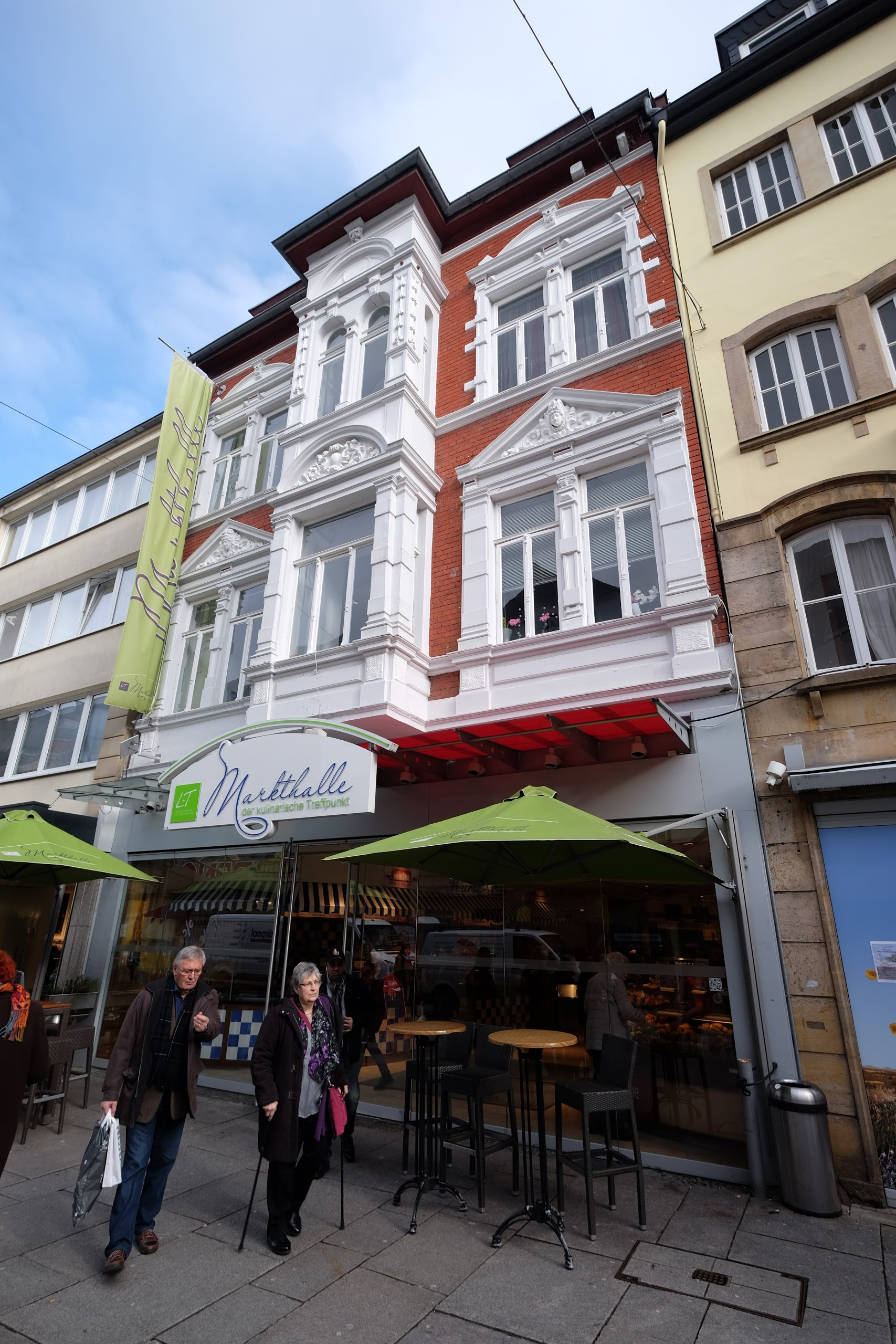 Innenstadt, 49074 Osnabrück, Germany